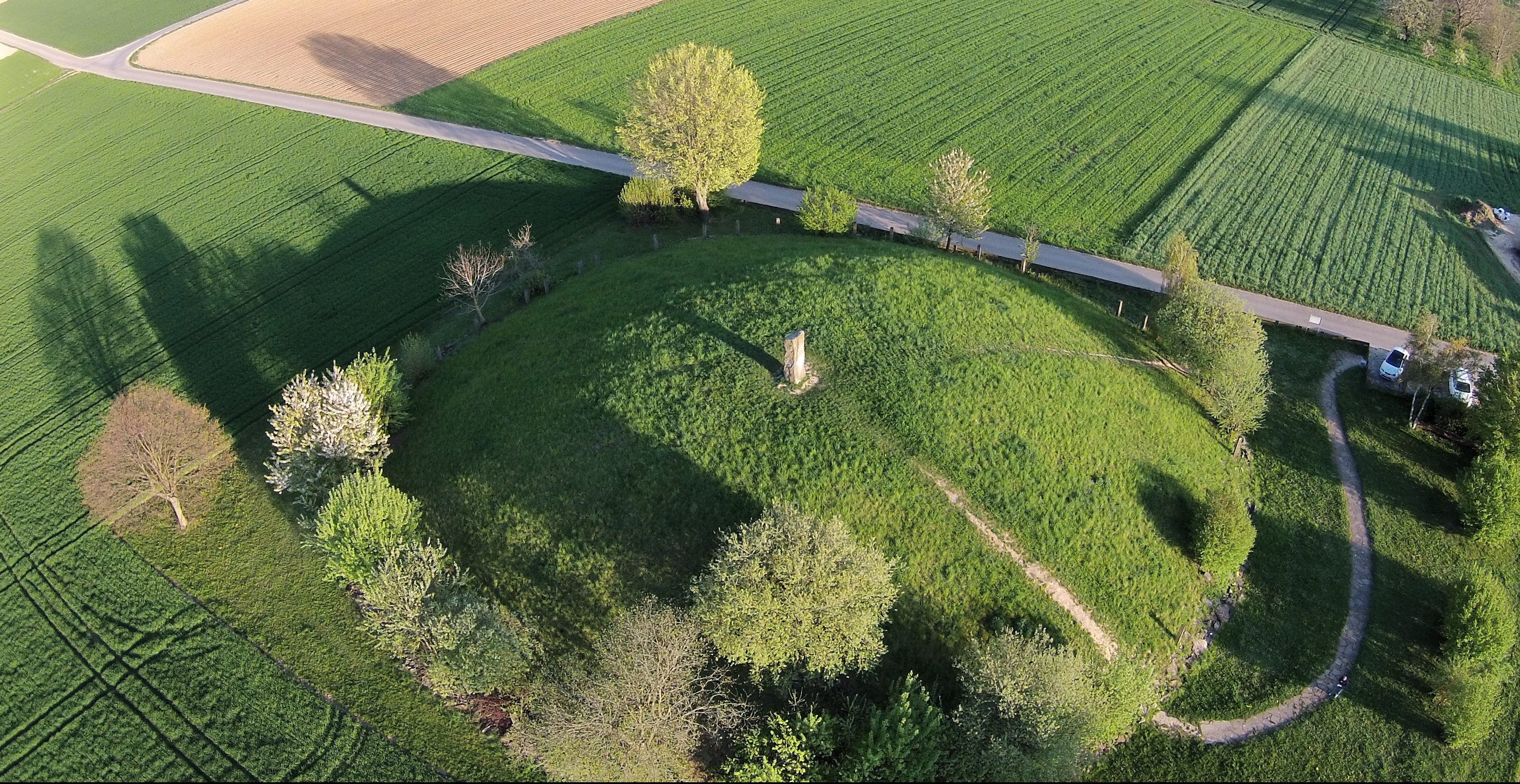 Luftaufnahme des Keltengrabhügels in Hochdorf aus nördlicher Richtung